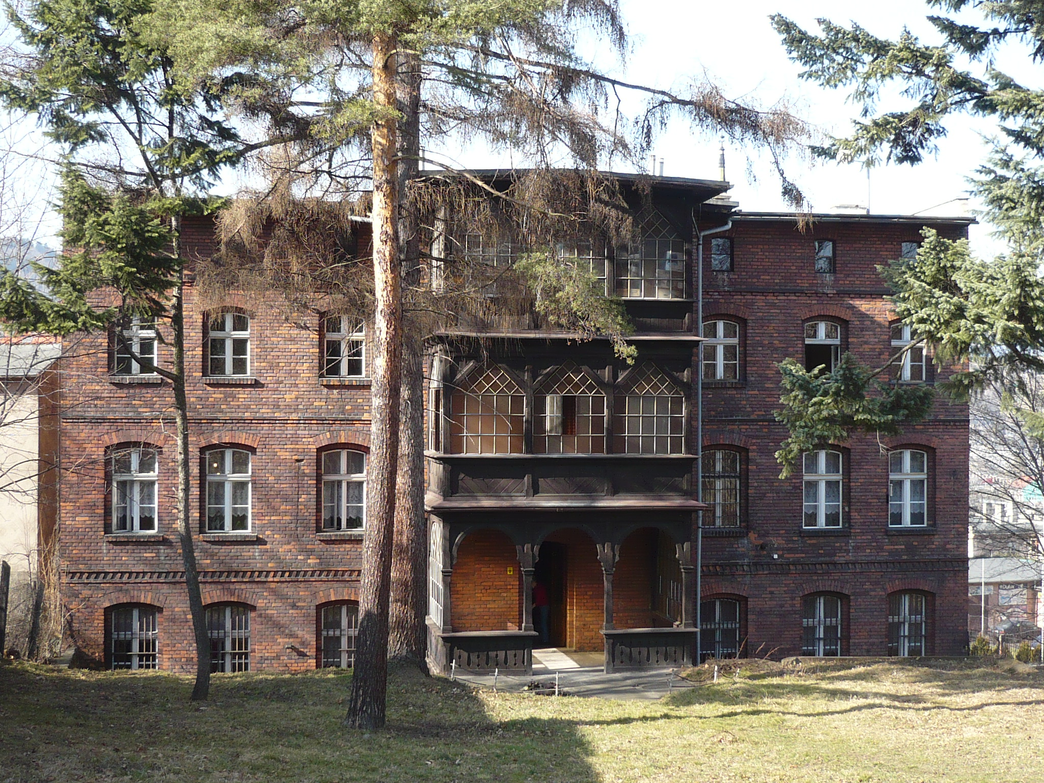 Nowa Ruda, ul. Kolejowa 18 - pierwotnie siedziba policji (do 1945), po II wojnie światowej milicji, UB, obecnie MOPS, 1892